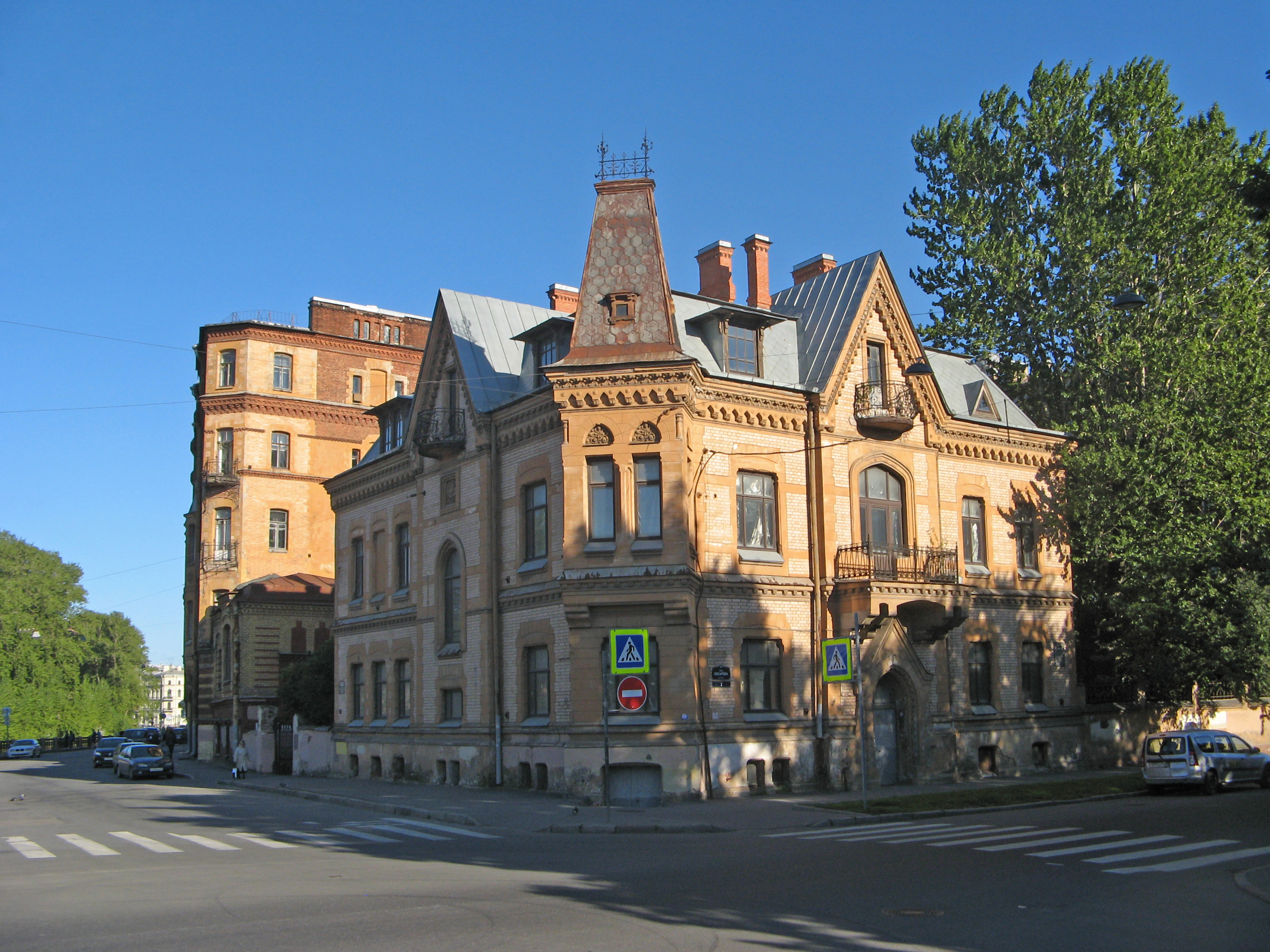 Особняк В.А. Шретера: набережная р. Мойки, 114, Адмиралтейский район, Санкт-Петербург